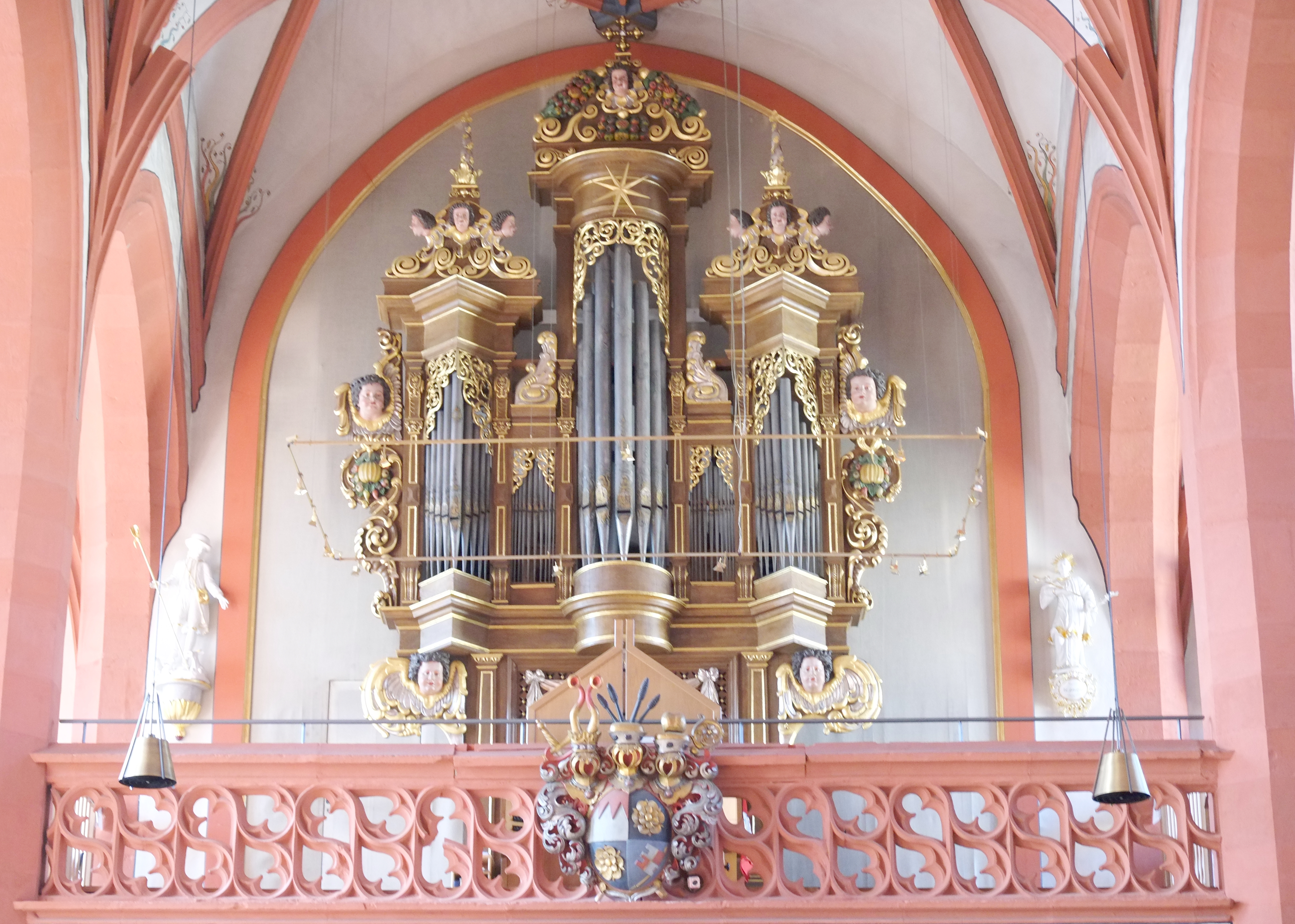 Katholische Pfarrkirche St. Andreas in Karlstadt im Main-Spessart-Kreis (Bayern, Deutschland), Orgel